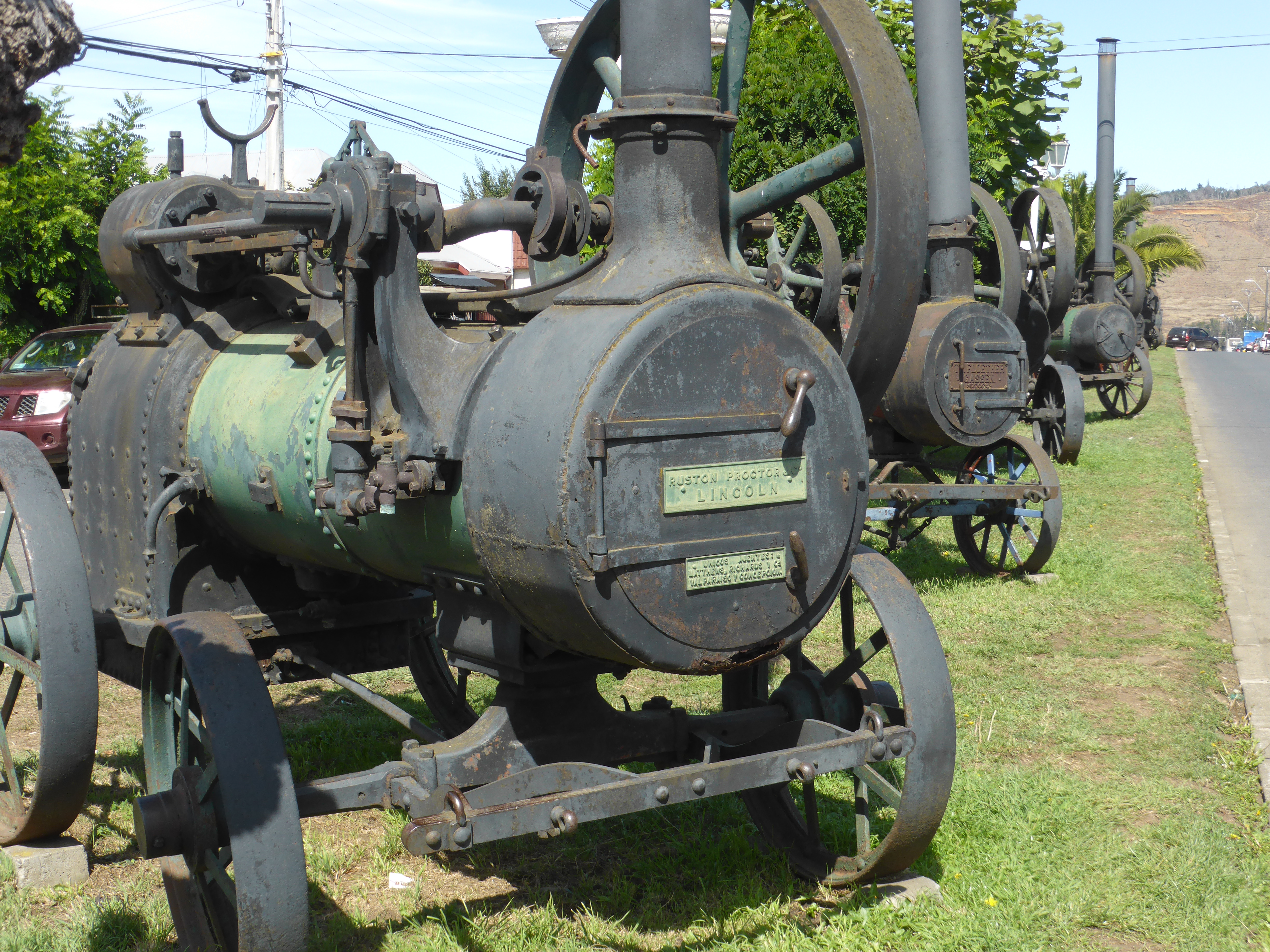 Locomóviles agrícolas en la Avenida Ercilla, de la ciudad de Carahue, Chile. El más cercano fue fabricado por "Ruston, Proctor & C°", en Lincoln, Inglaterra.